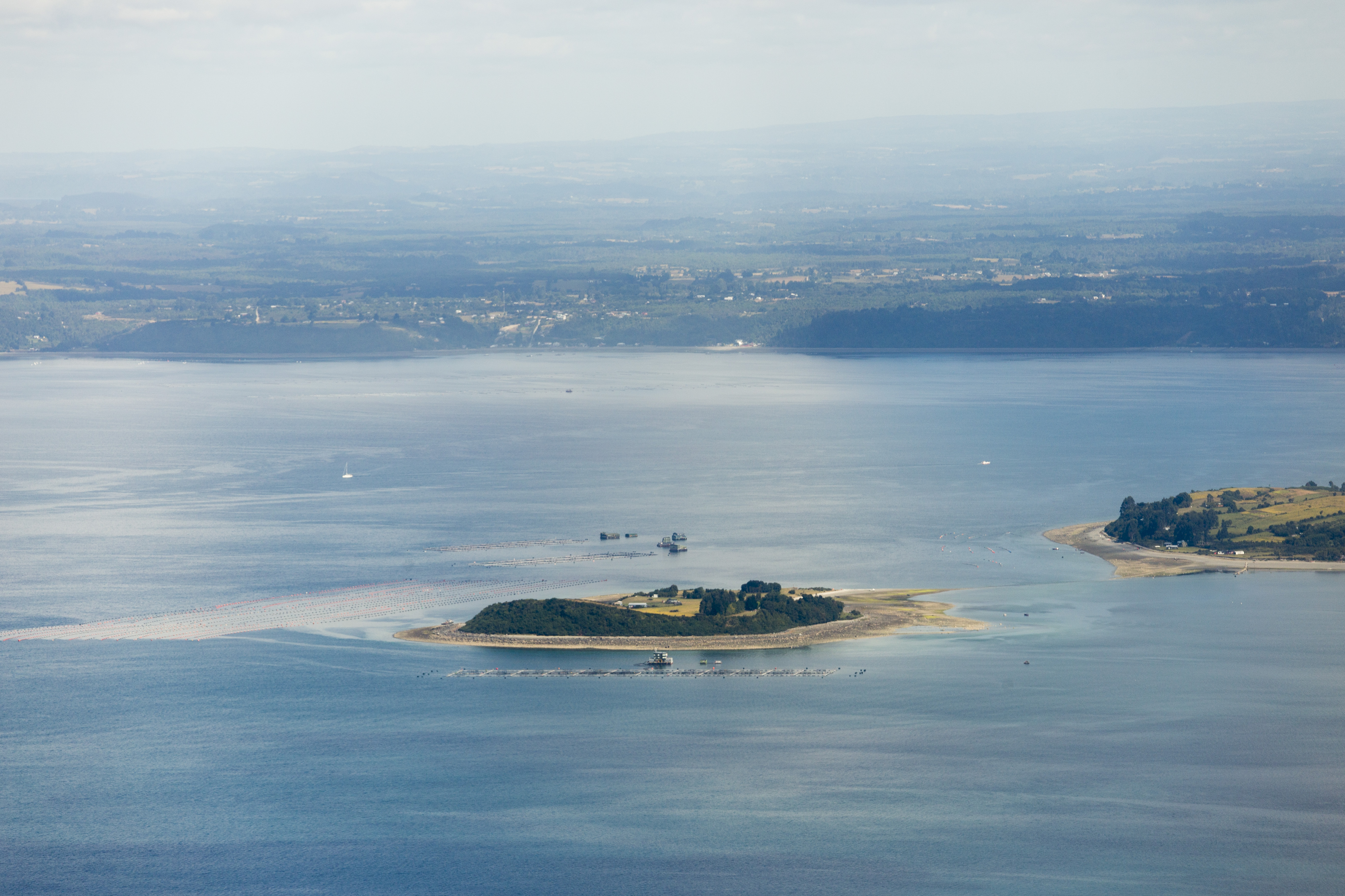 Isla Capehuapi en el seno de Reloncaví, Región de Los Lagos.